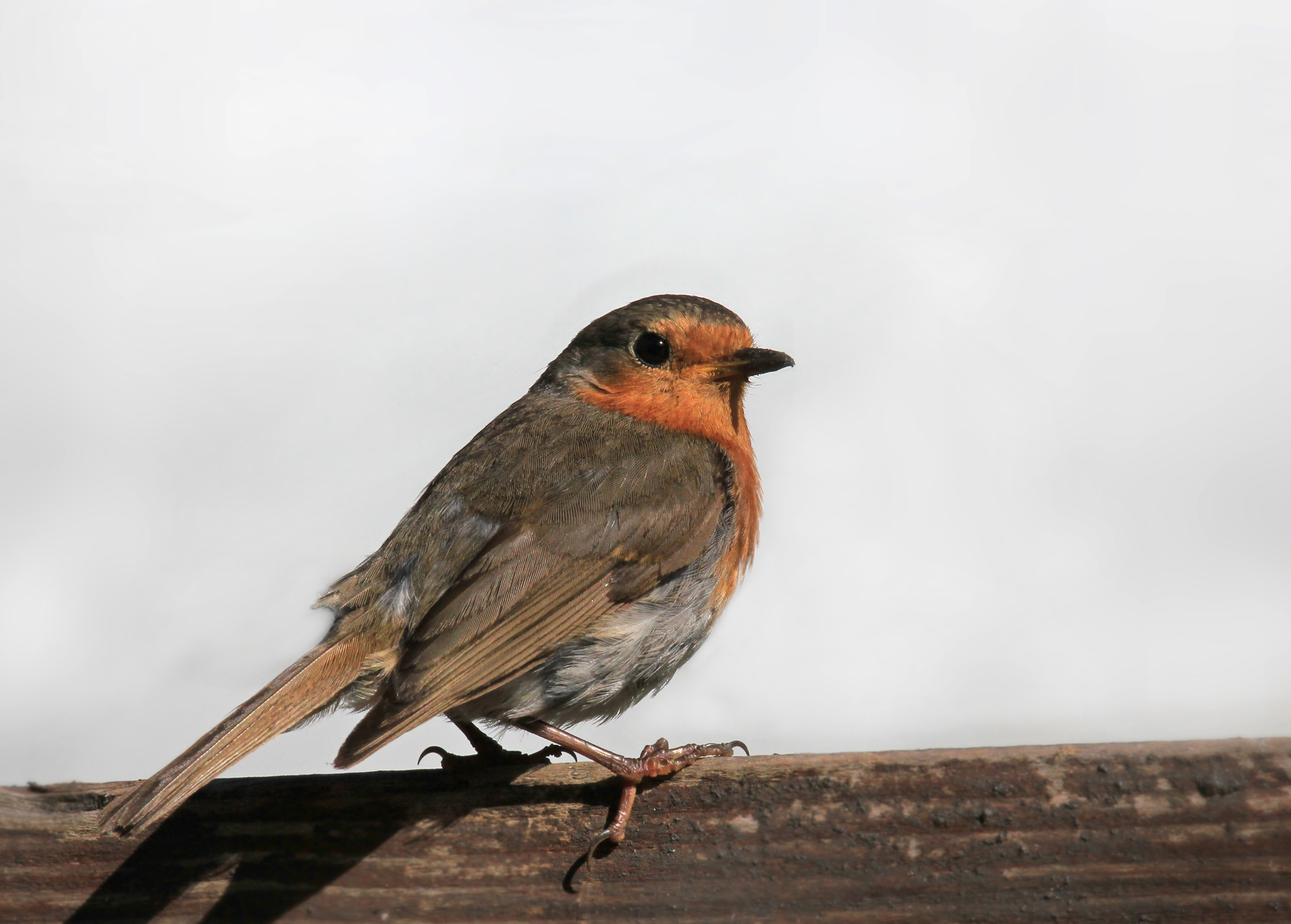 Punarind valge ukse juures